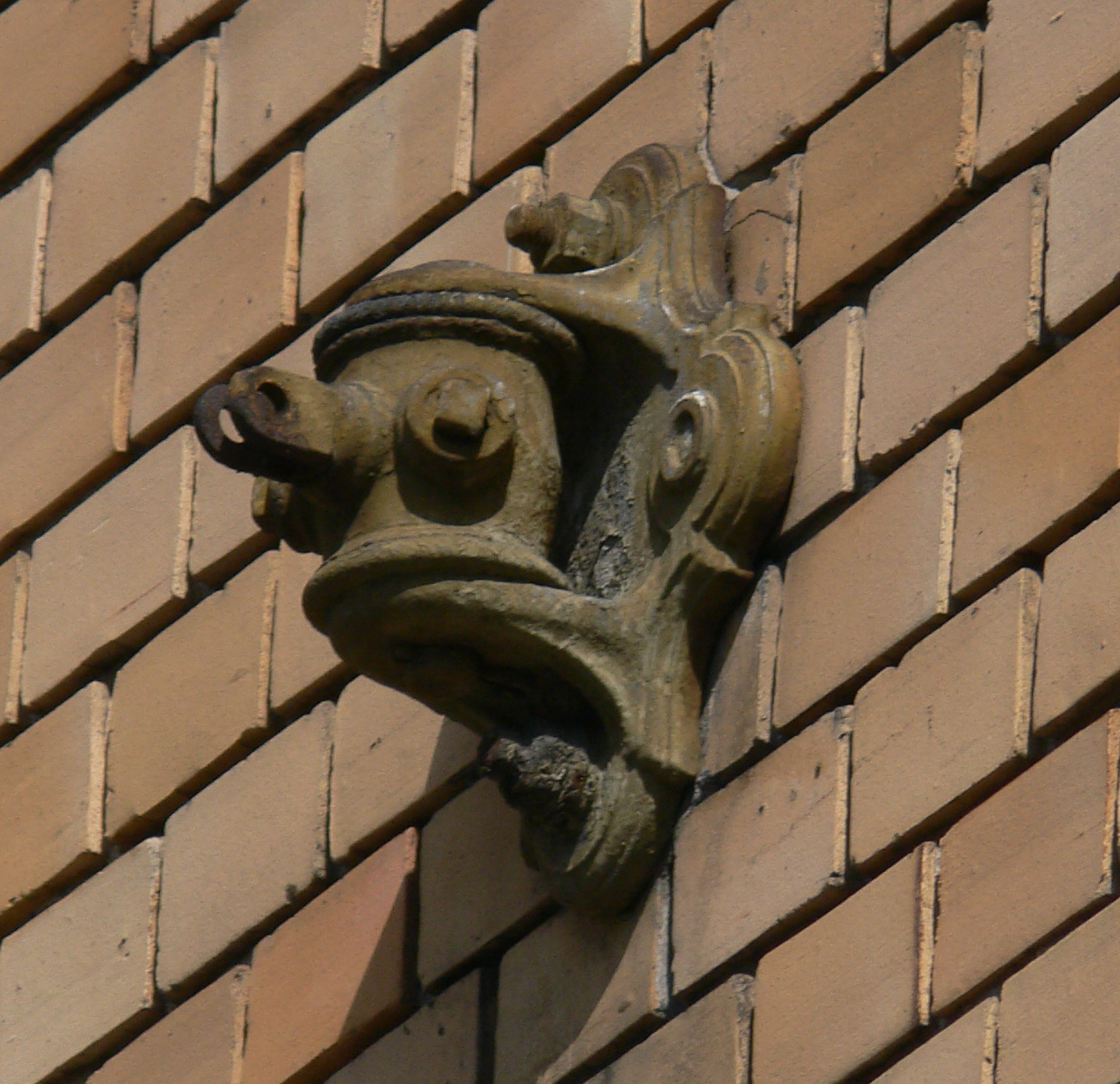 Ravensburg Oberleitungsrosette der ehem. Straßenbahn Ravensburg-Weingarten-Baienfurt am Gebäude Schussenstraße 2